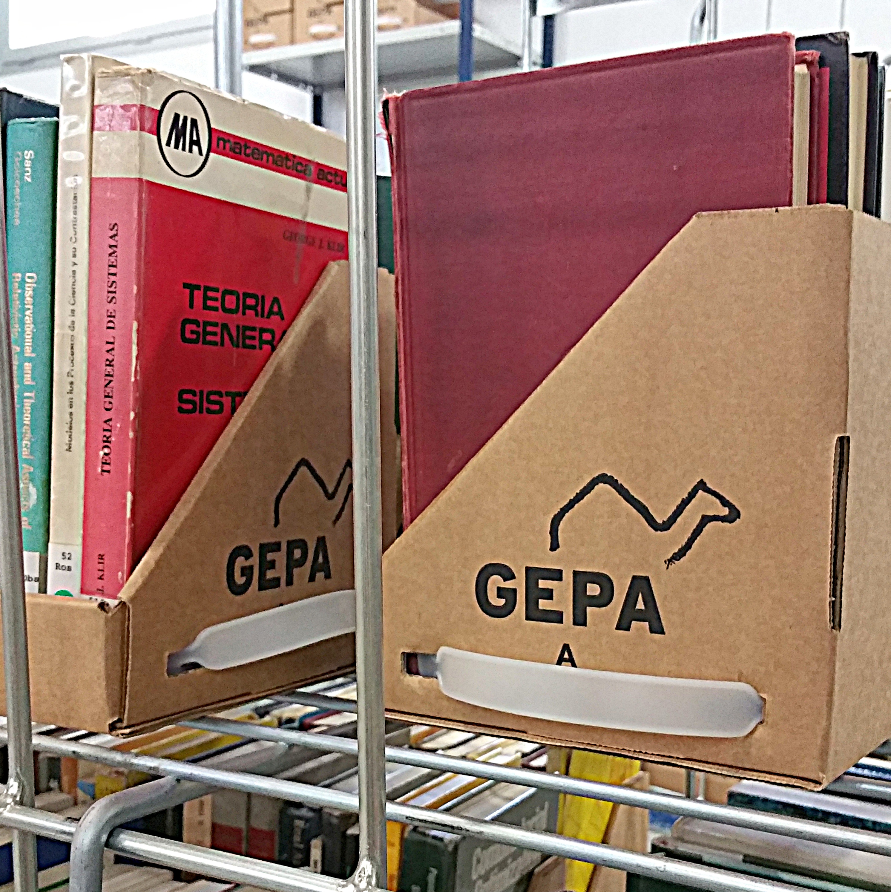 GEPA